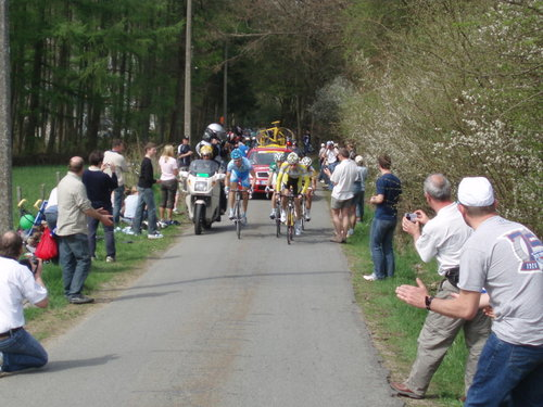 De kopgroep (vroege vluchters), v.l.n.r. Fothen, Rolland, Brutt en Kopp, tijdens Luik-Bastenaken-Luik 2008